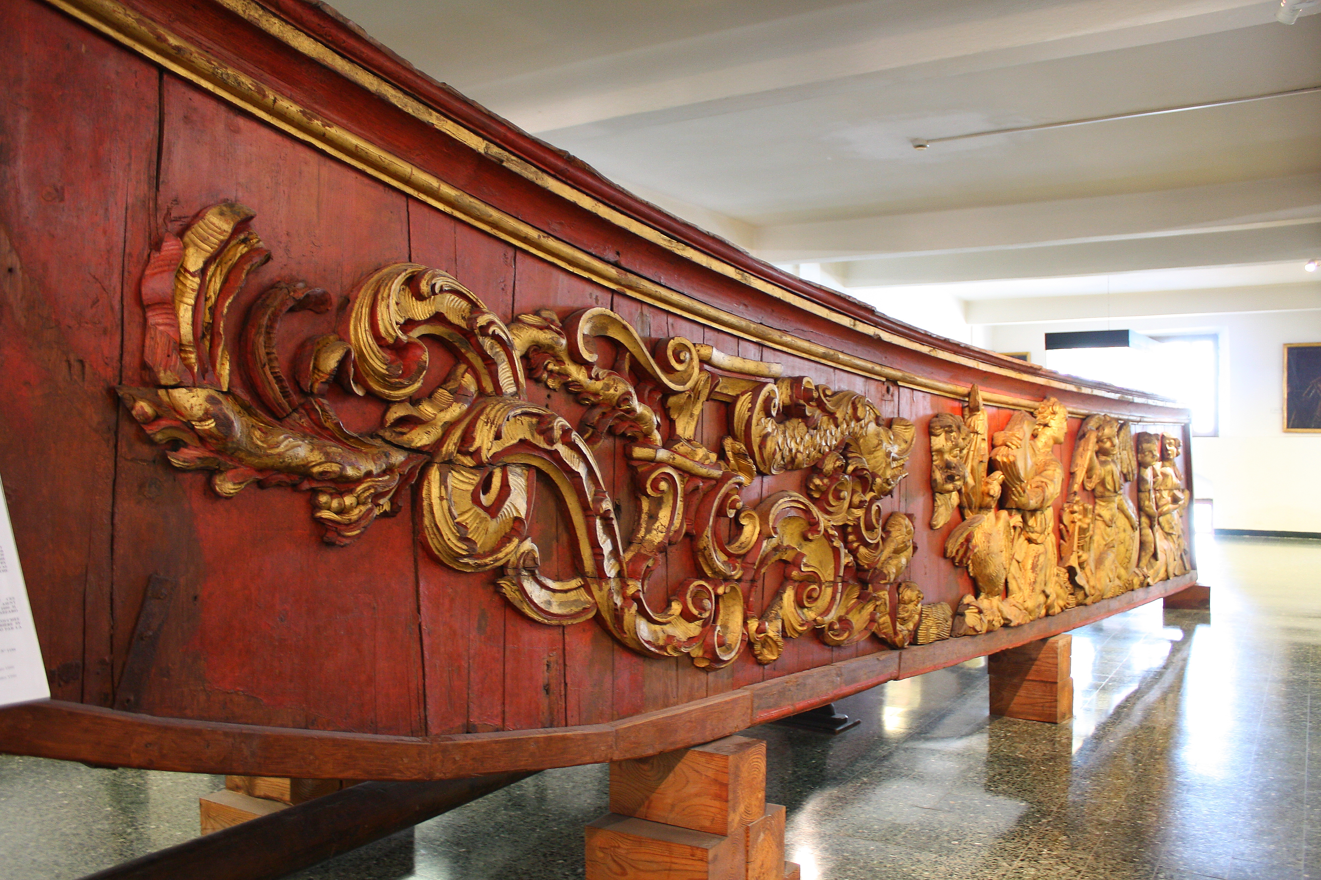 Galeerenornament aus dem 17. Jahrhundert, Venedig